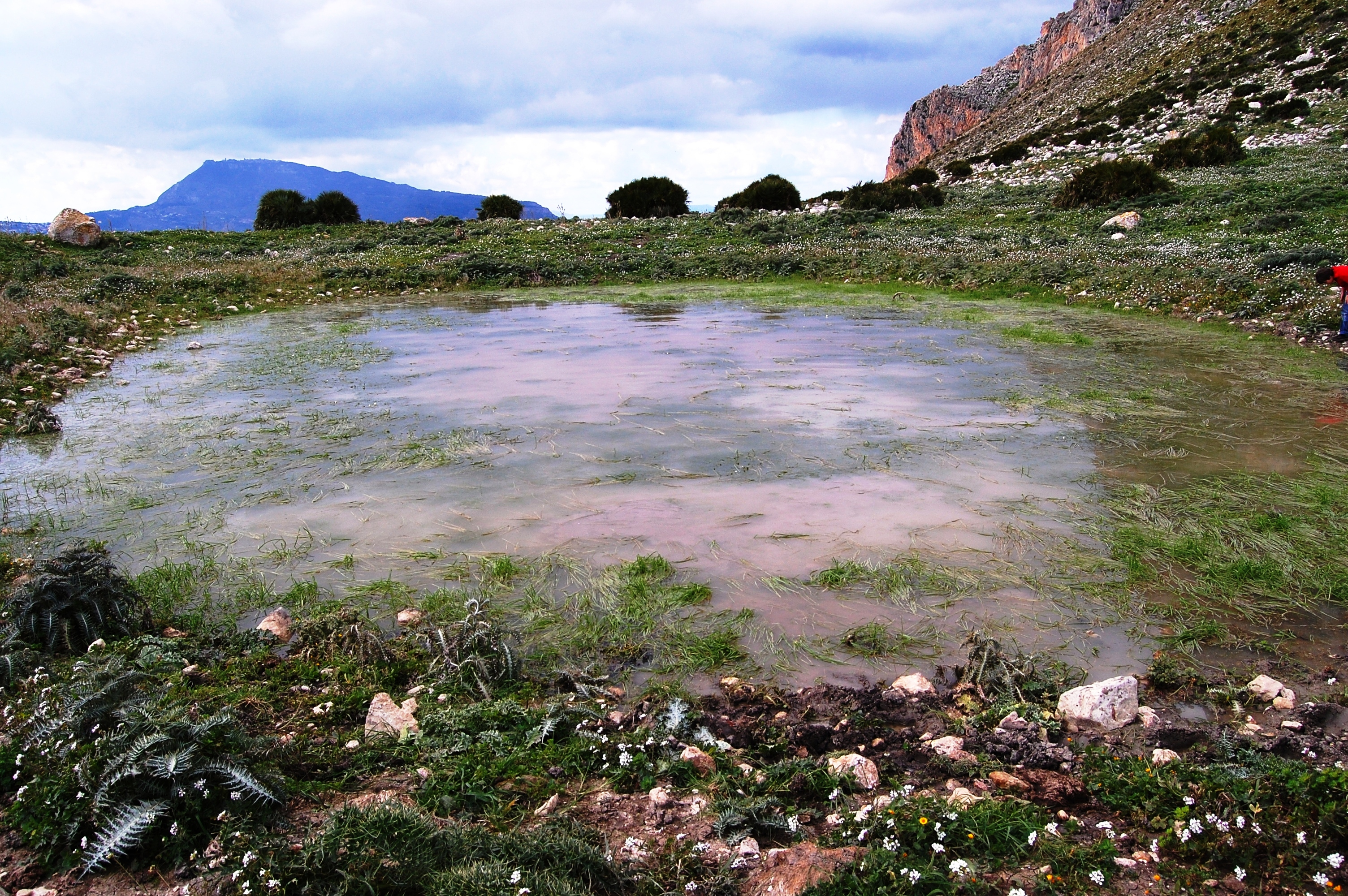 Riserva naturale Monte Cofano, Sicily Gorgo Cofano